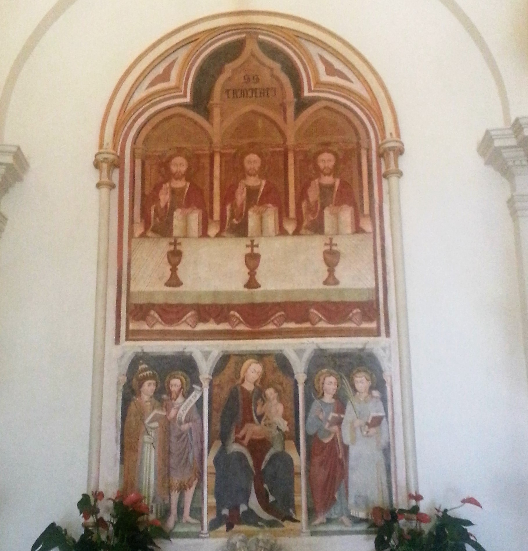 Affresco dela Ss. Trinità nel santuario di Fiobbio frazione di Albino